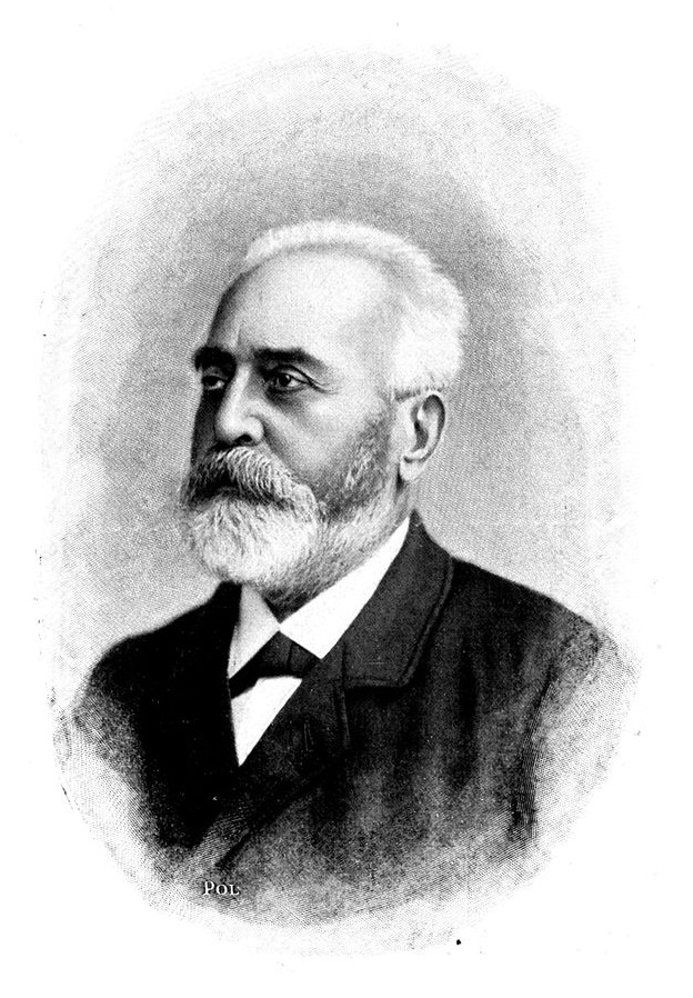 Jakob Hunziker (1827–1901), Schweizer Lehrer, Volkskundler und Dialektologe